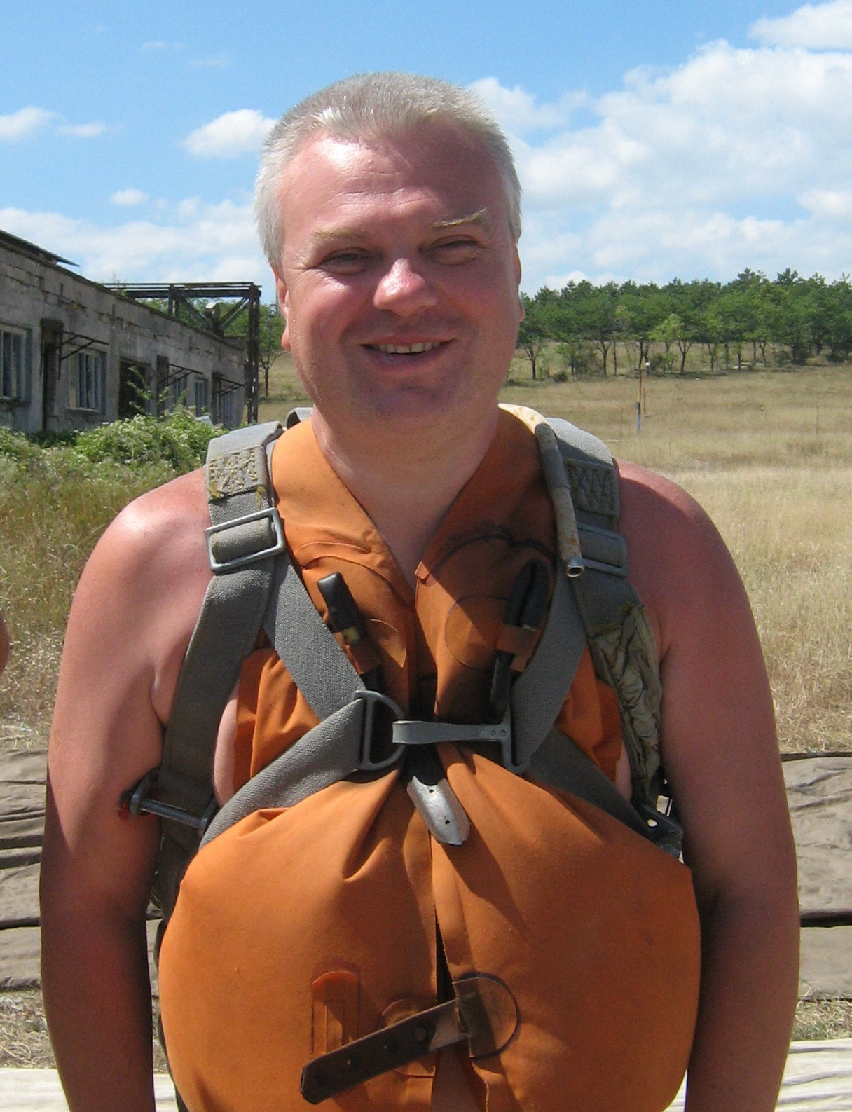 Володимир Петровський, один з п`яти незрячих парашутистів, які 24 серпня 2009 року вперше в світі здійснили масовий стрибок з парашутом у відкрите море без інструктора, не в тандемі.